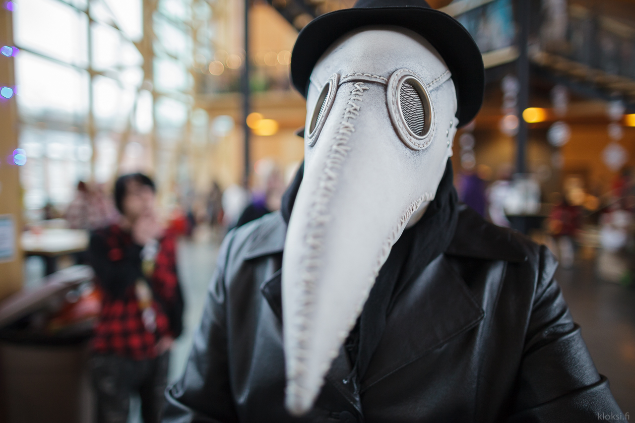 Desucon Frostbite 2014. Sibeliustalo, Lahti